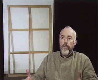 Portrait de Daniel Dezeuze